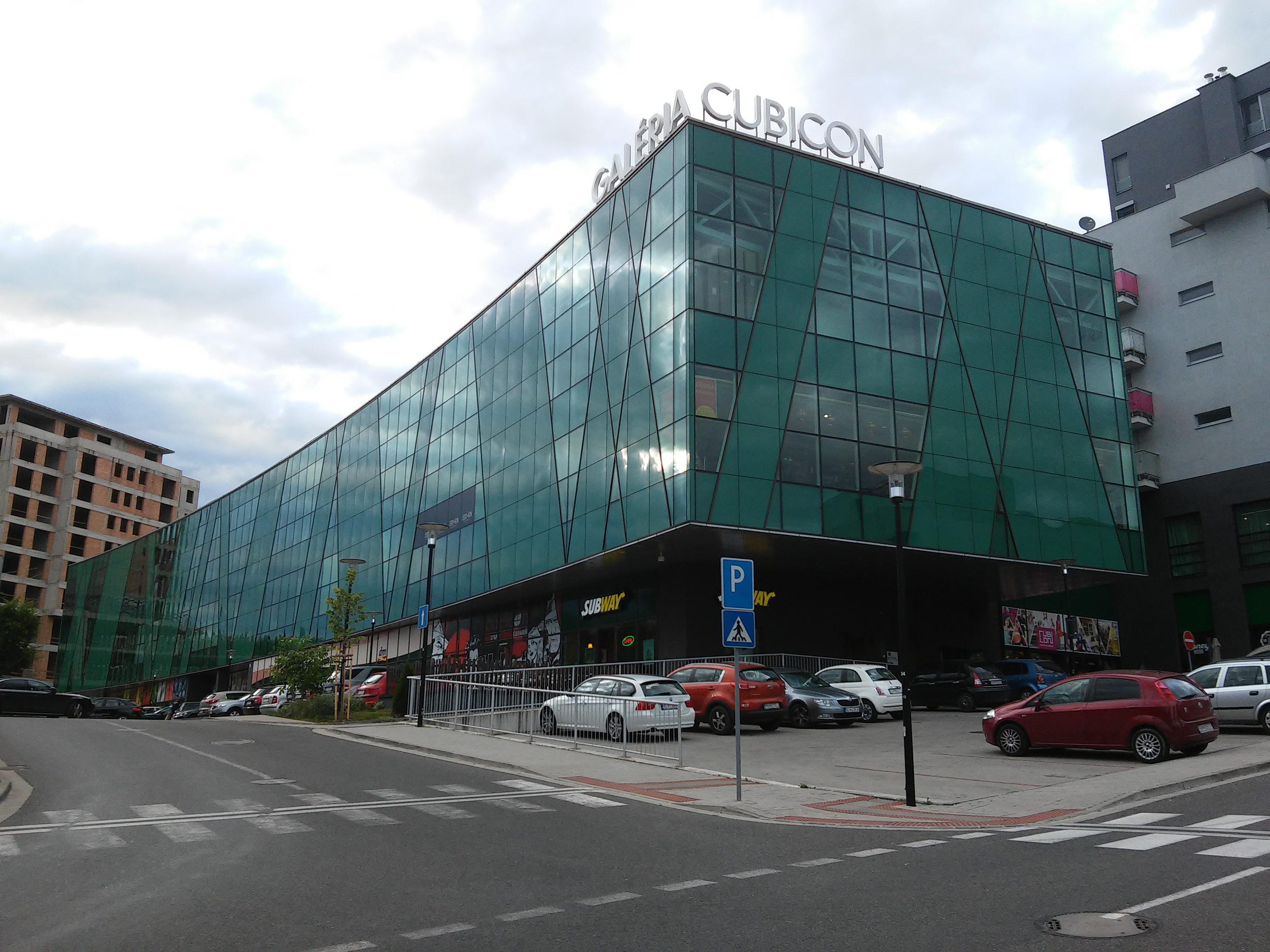 Cubicon, Karlova Ves, Bratislava